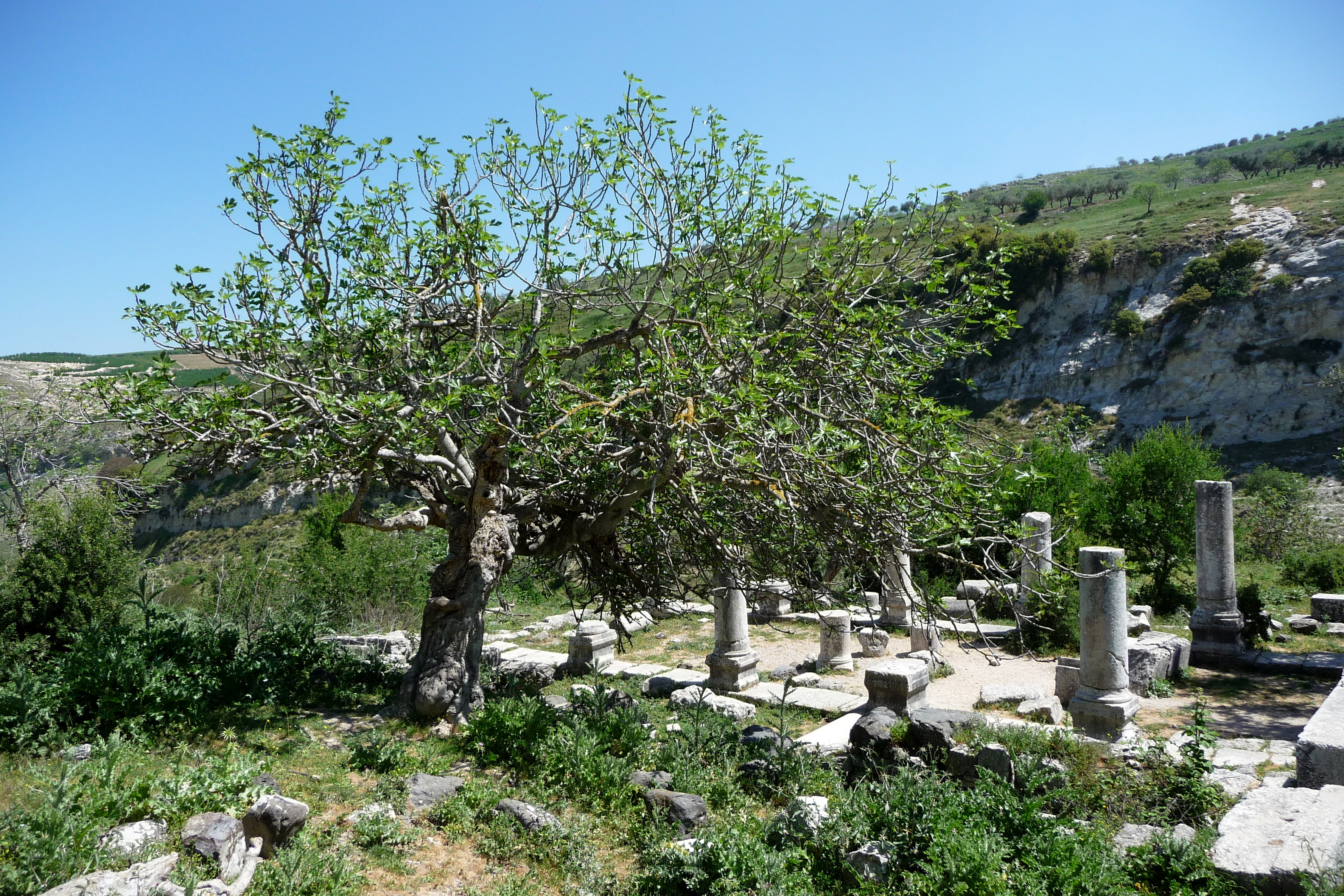 לרגלי הכפר, נמשך לצפון-מזרח כביש לאורך נחל גוש חלב. כביש זה מסתיים בדרך ובשביל. כעבור כמחצית ק"מ מתוי כרם תאנים ובתוכו שרידי בית כנסת קדום.